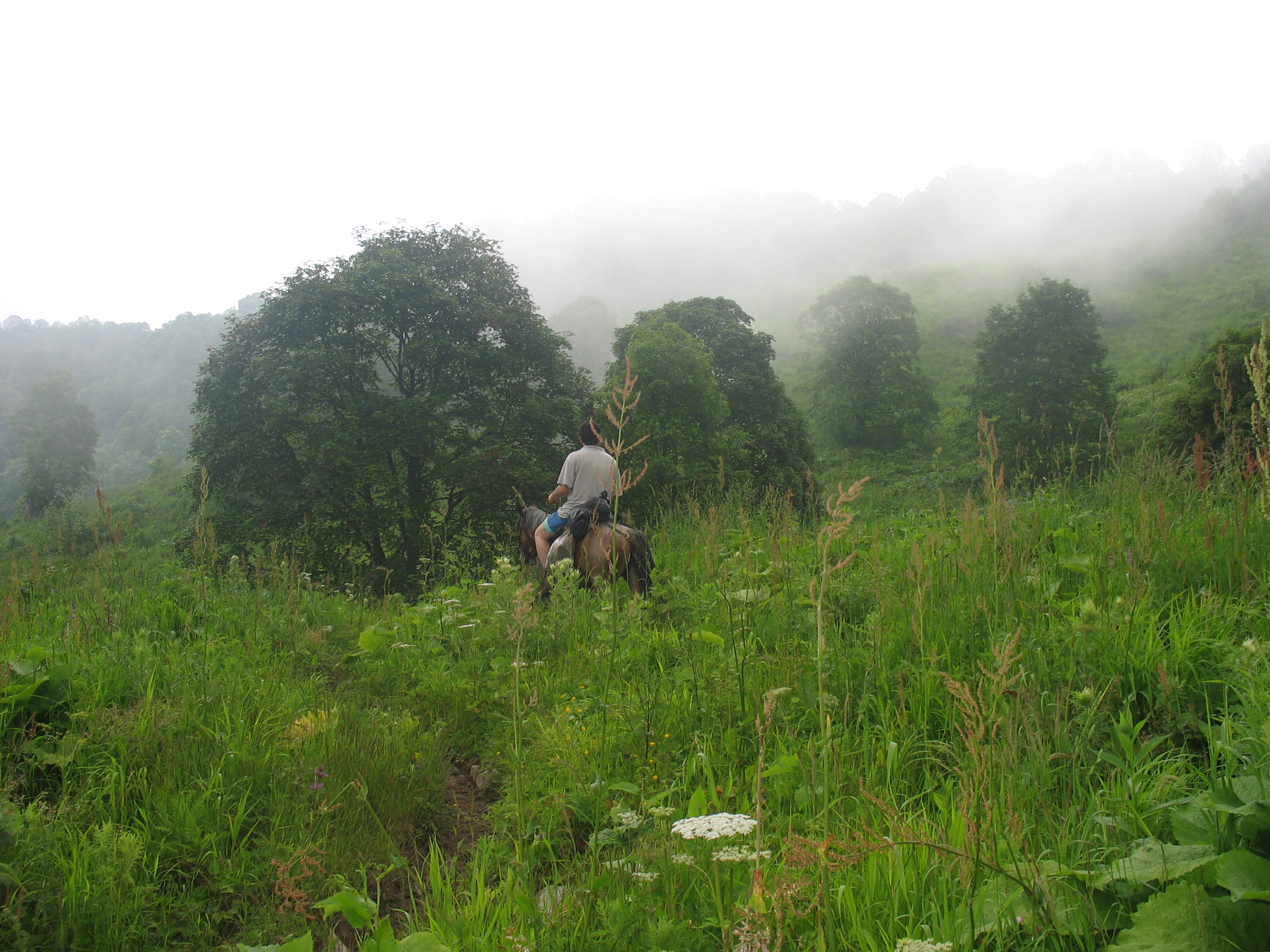 ლაგოდეხის ნაკრძალი